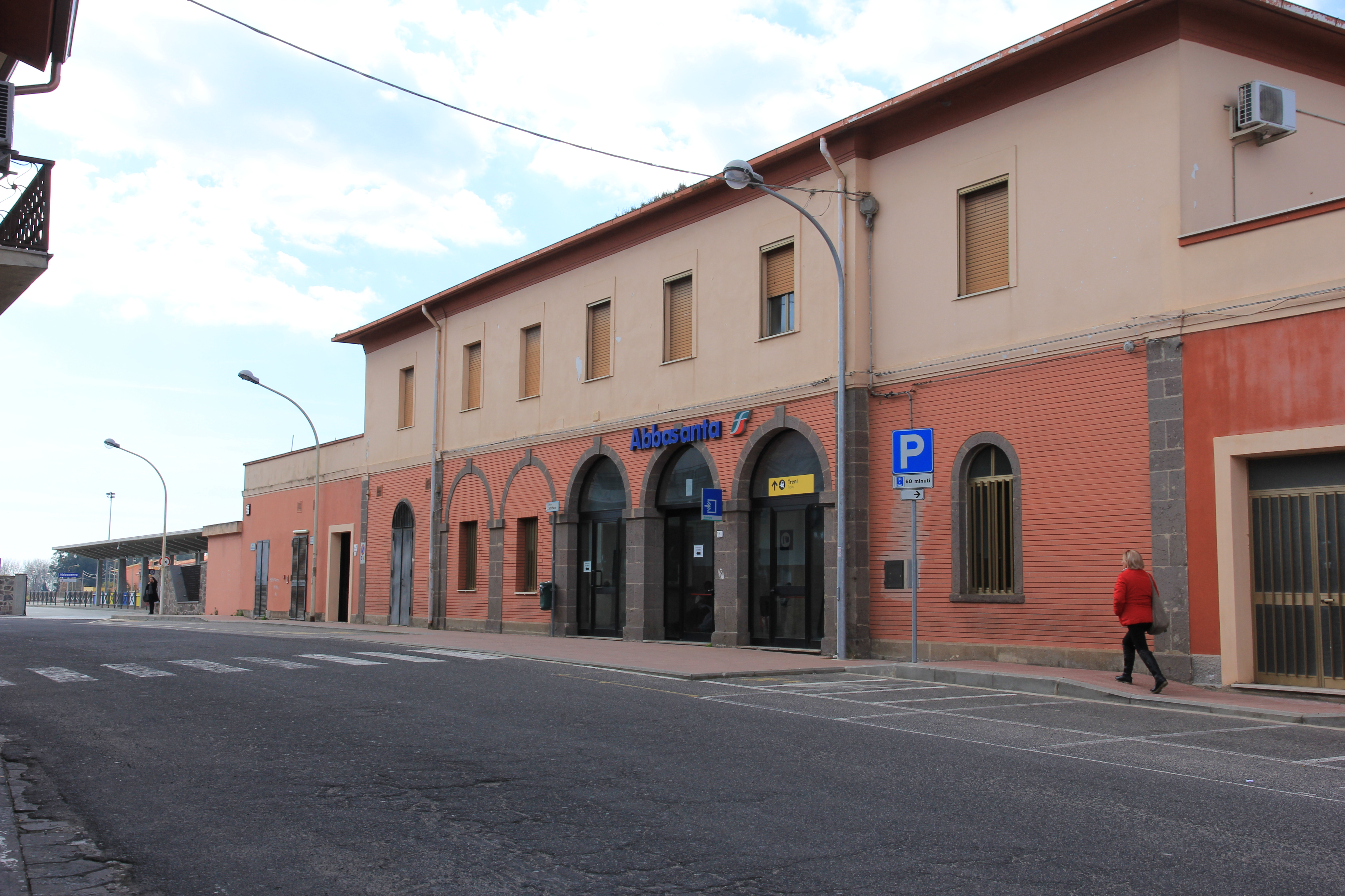 Abbasanta - Stazione ferroviaria